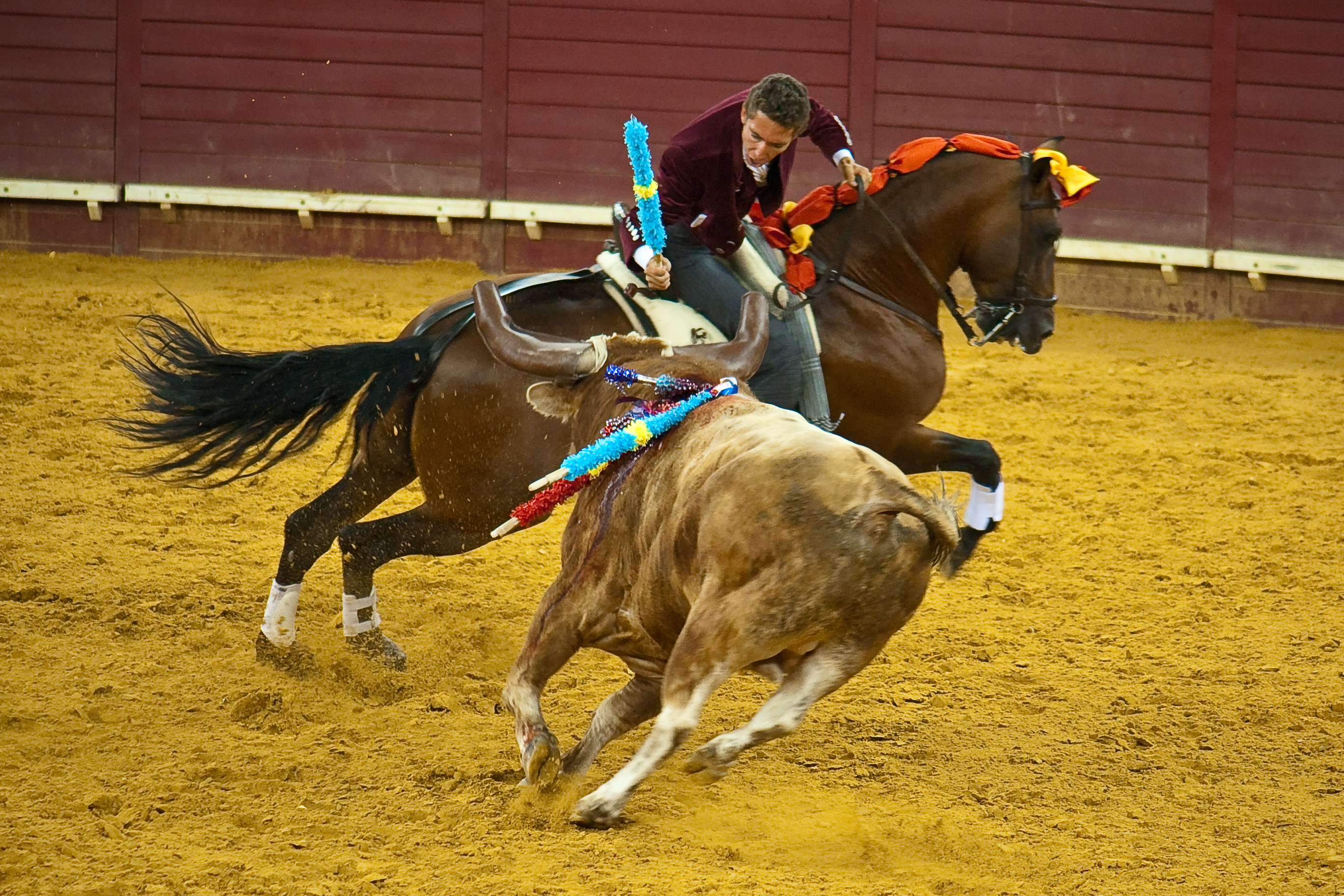 Toureiro prestes a espetar umas bandarilhas num Touro, no Campo Pequeno.